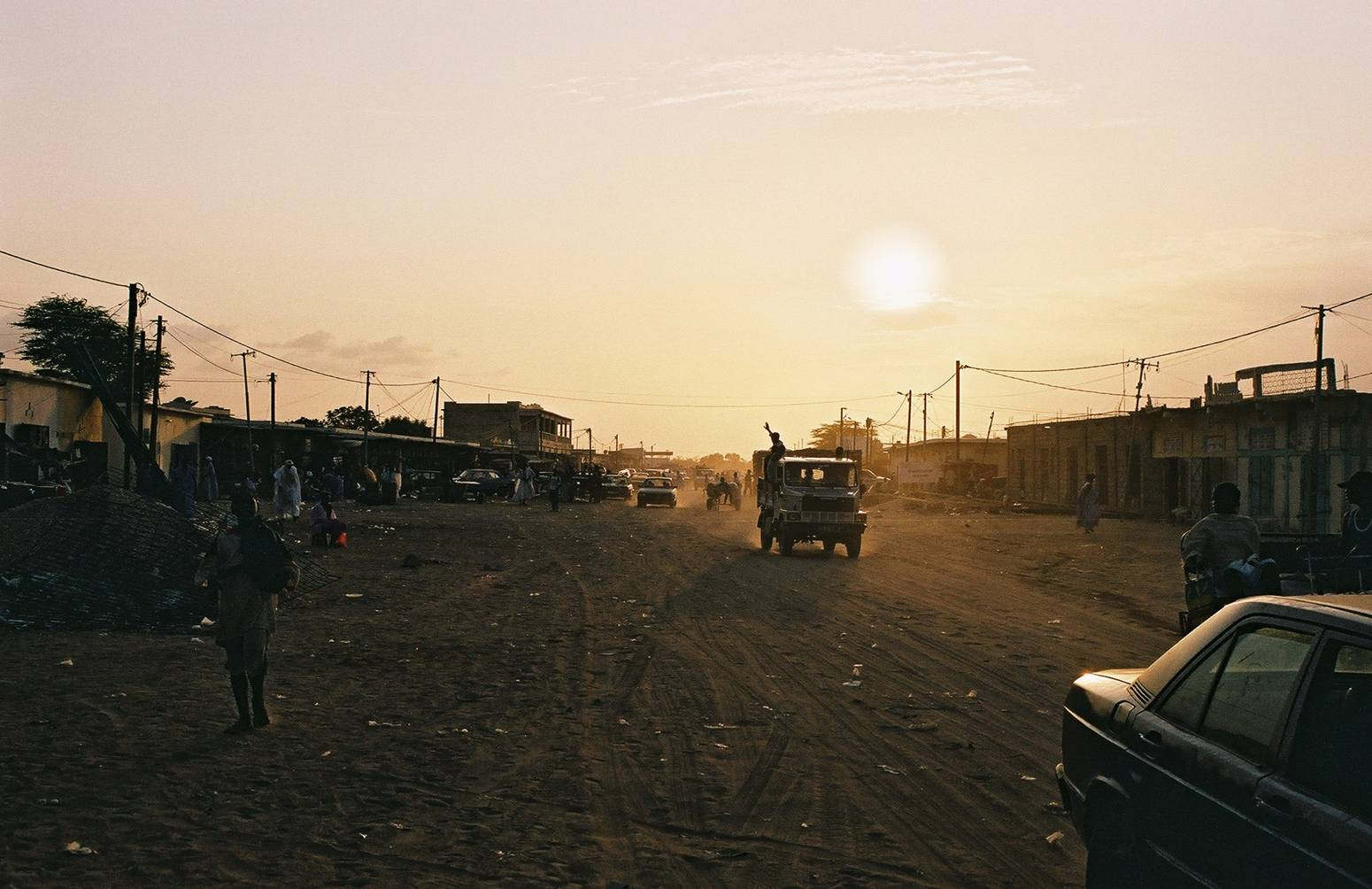 Rue principale de Rosso en Mauritanie